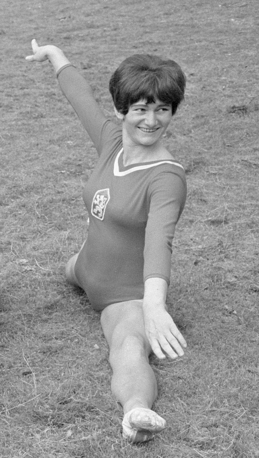 Damesturnen: Nederland tegen Tsjecho-Slowakije in Arnhem [Terborg]. Ruzickova